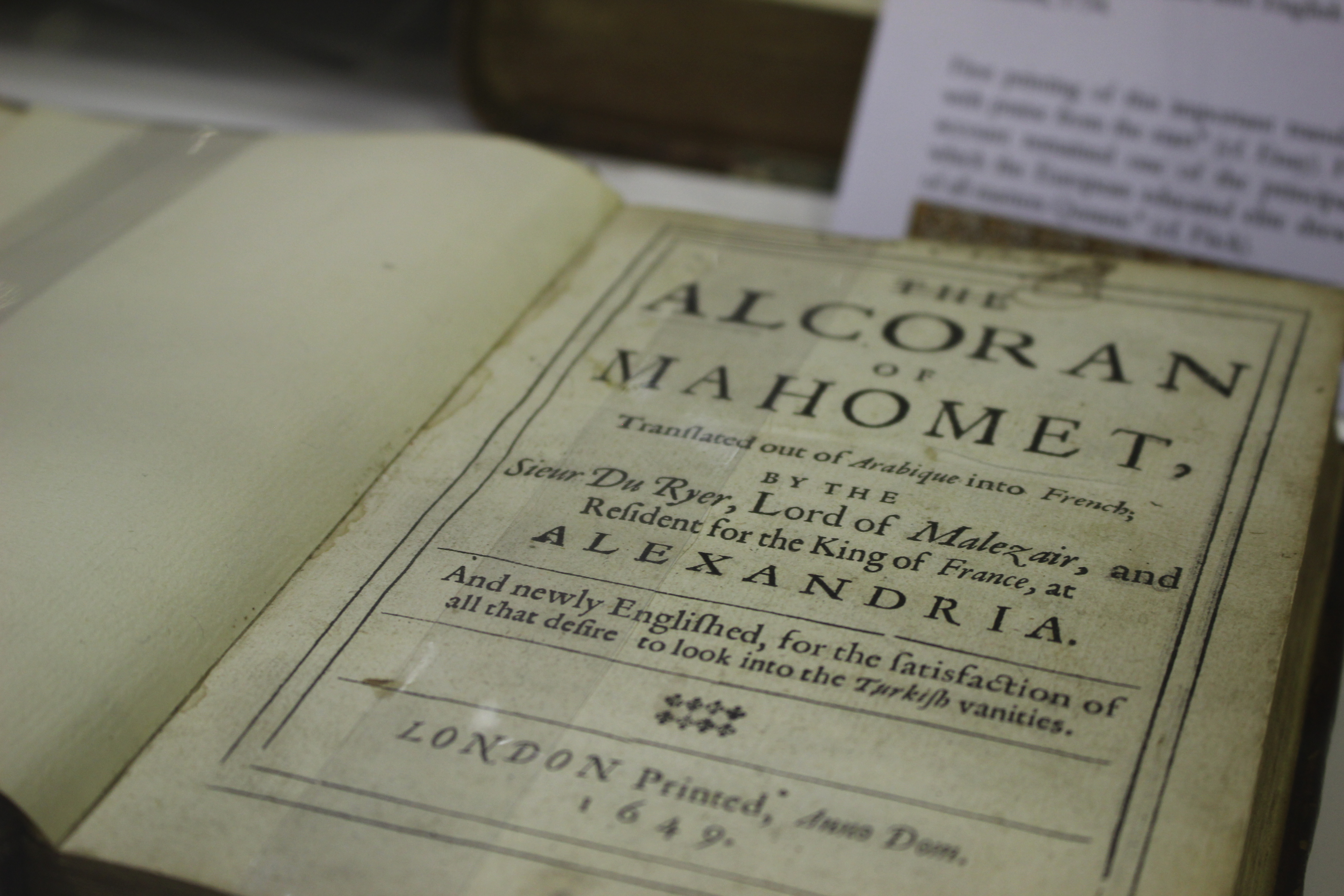 The Alcoran of Mahomet, traduit par Alexander Ross, 1649 - Foire du Livre de Charjah